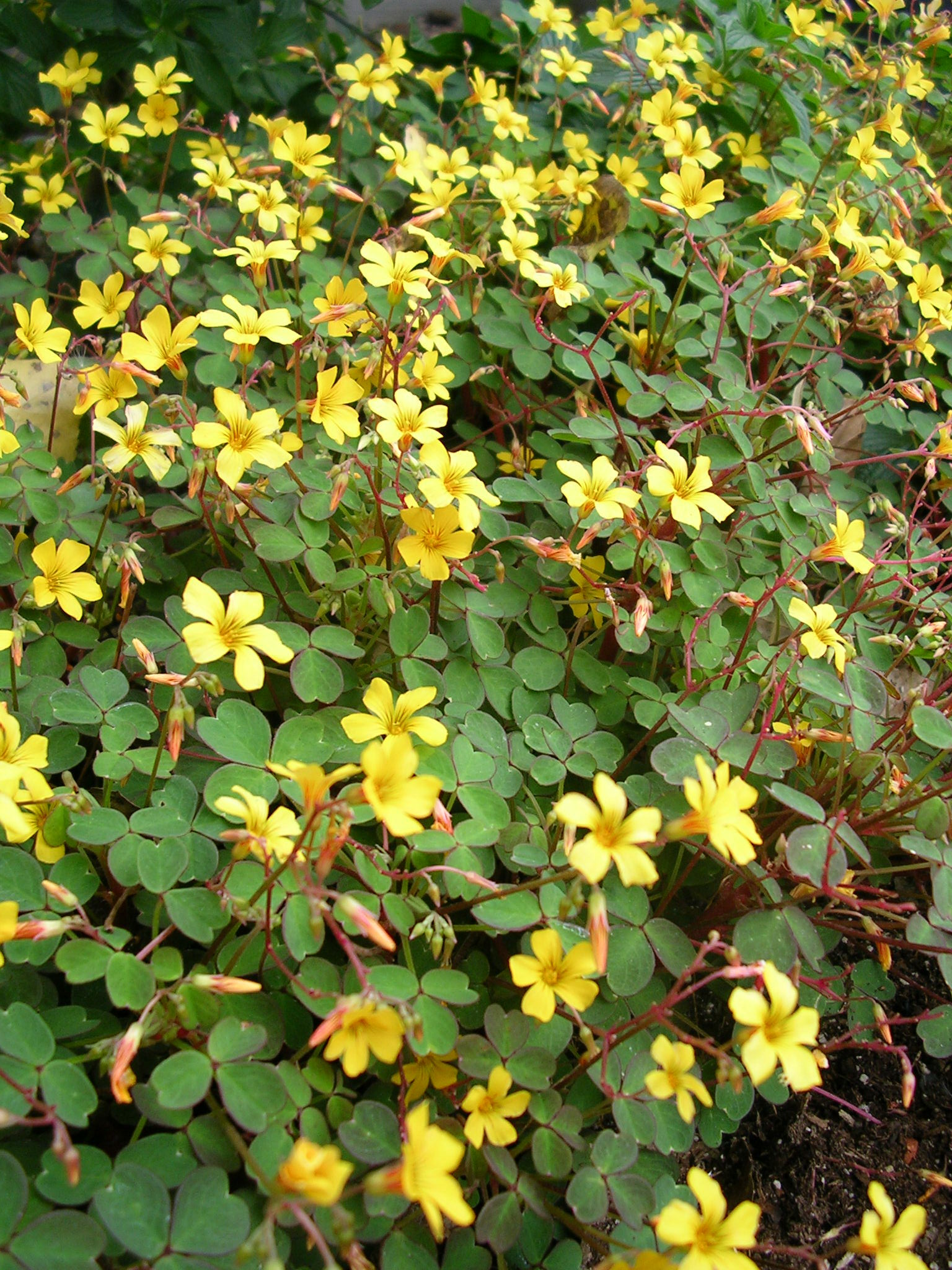 Oxalis spiralis vulcanicola